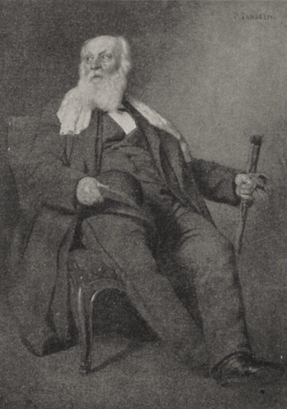 Bildnis des Malers Ludwig Holthausen, Inspektor der Kunstakademie von 1868 bis 1880, Peter Janssen der Ältere, um 1880